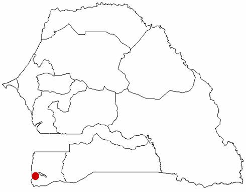 Localisation : Carabane (Casamance, Sénégal)